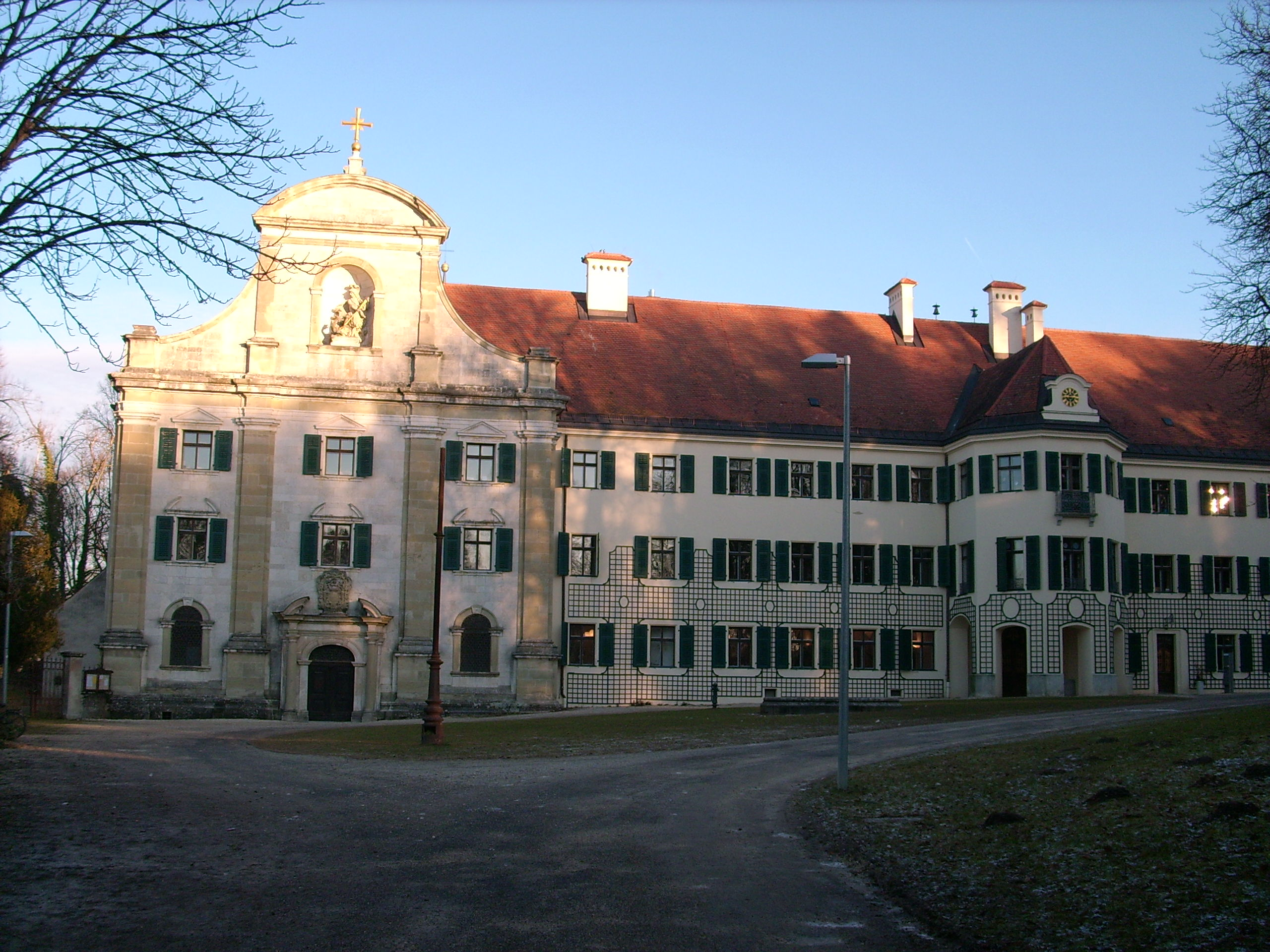 Sicht zur Kloterkirche und Klostergebäude